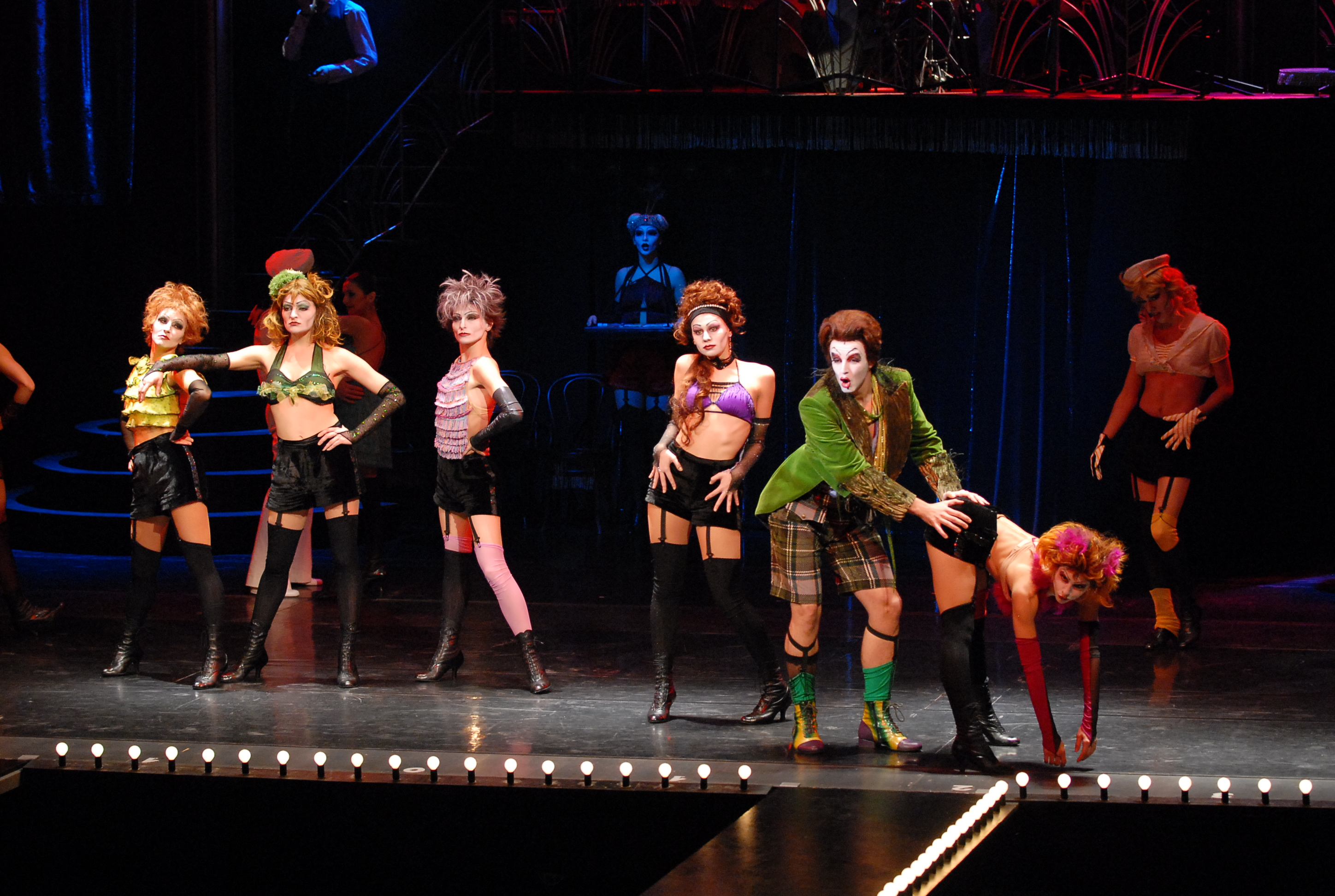 Premijera predstave "Kabare"